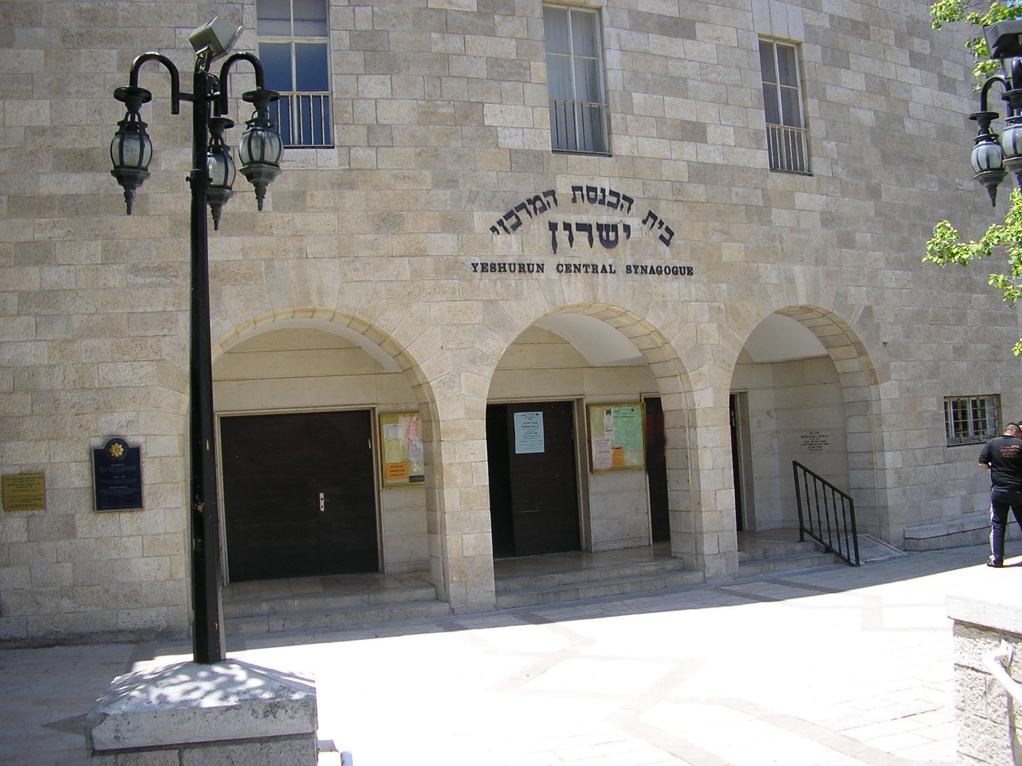 חזית בית הכנסת "ישורון" בירושלים.